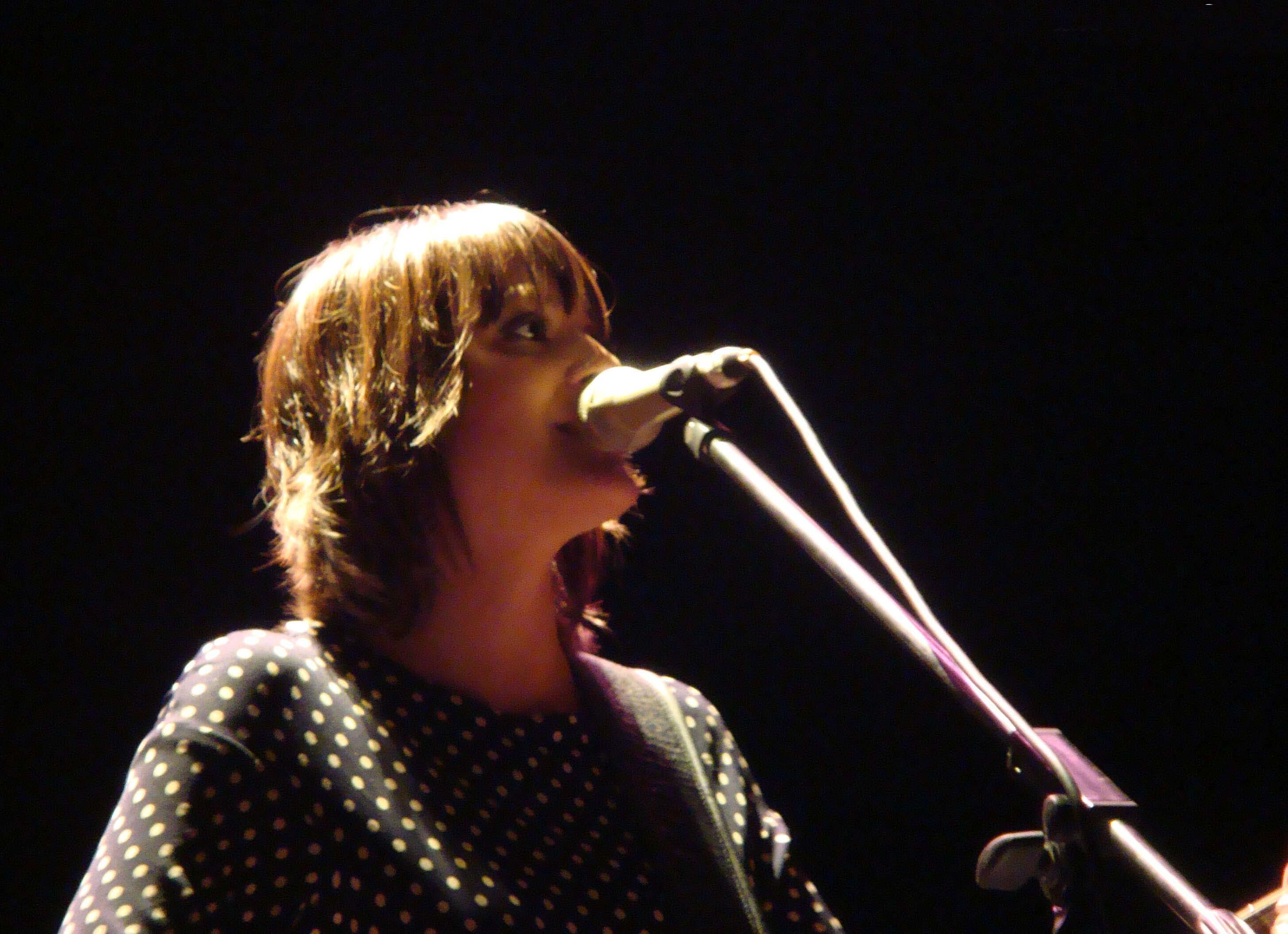 Keren Ann